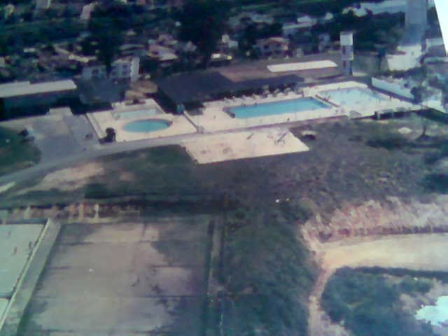 Vista Aérea da Sede social